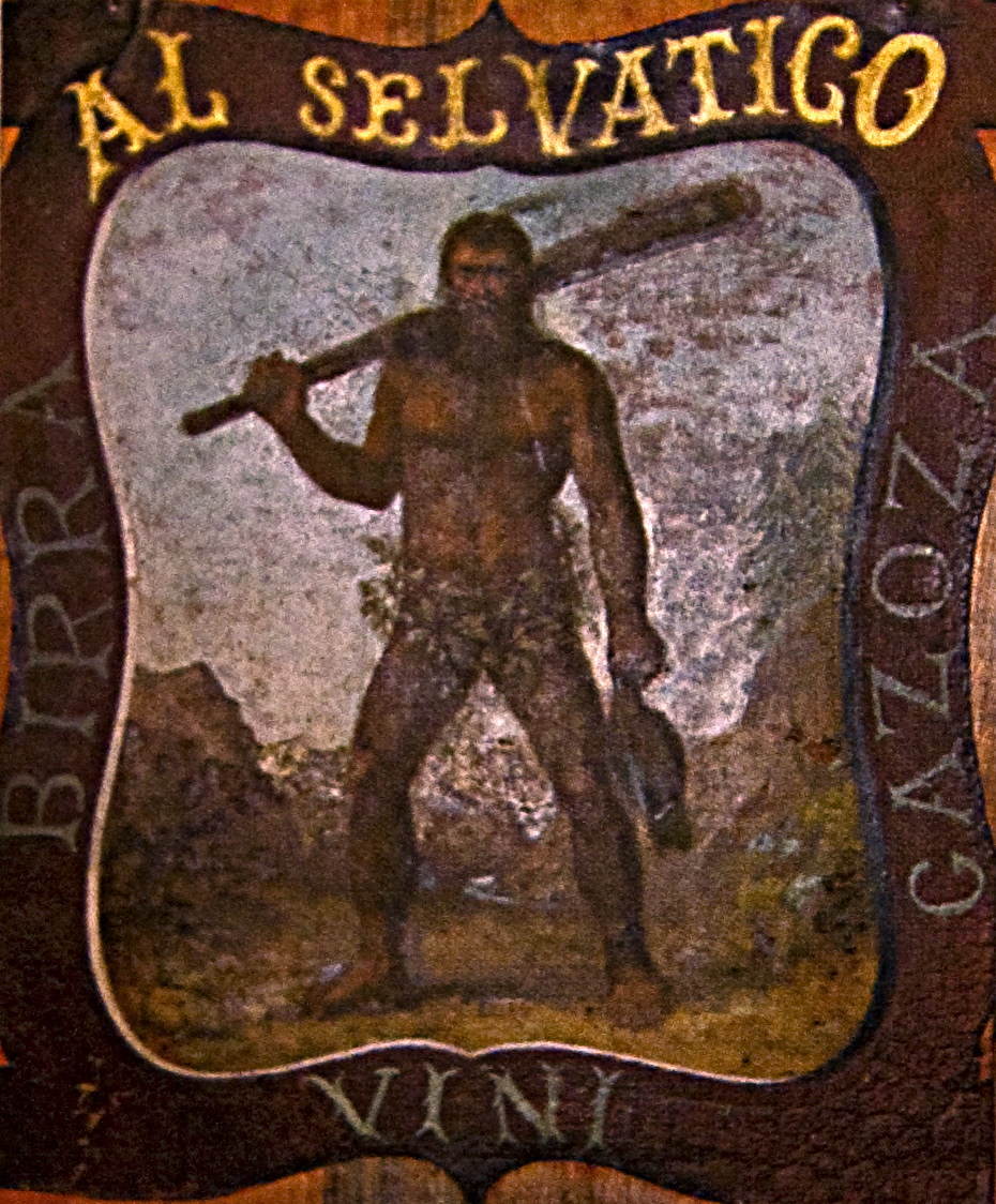 insegna dell'antica osteria "al selvatico" di campertogno.